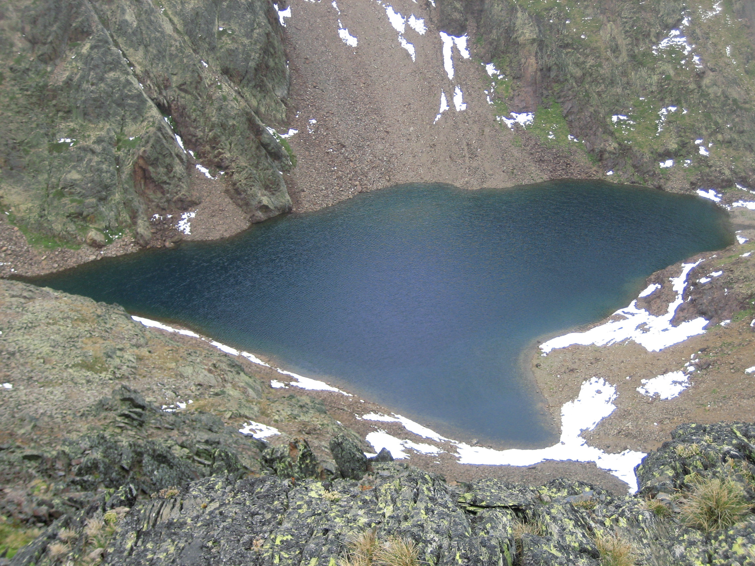 Het Estany Negre meer in Arinsal (La Massana, Andorra)